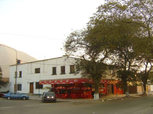 Cine de Chaclacayo Fuente: Nestor Ulaf Salcedo Zuta. Coleccion personal. Junio 2006